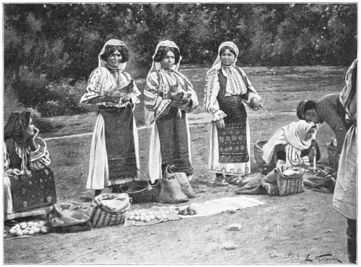 "Verkoopsters op de markt van Targu-Jiul" (Târgu Jiu)